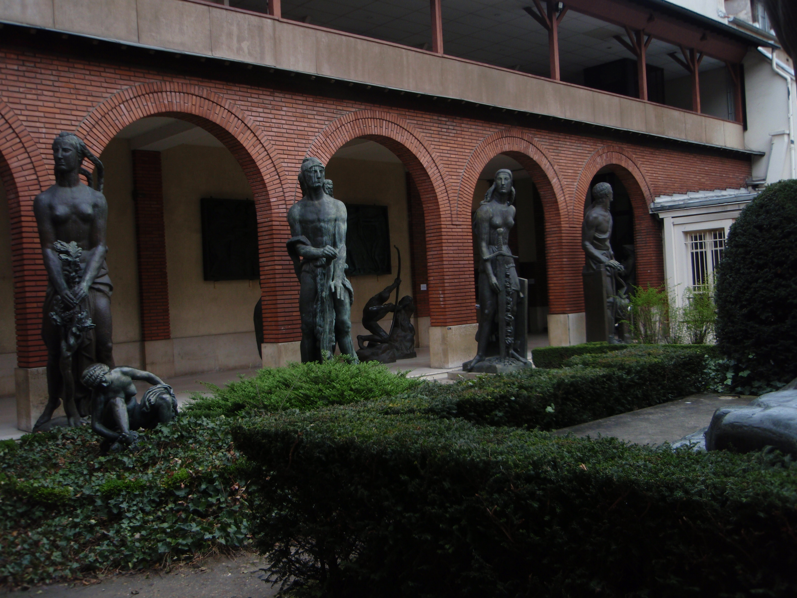 Le jardin du musée Bourdelle à Paris